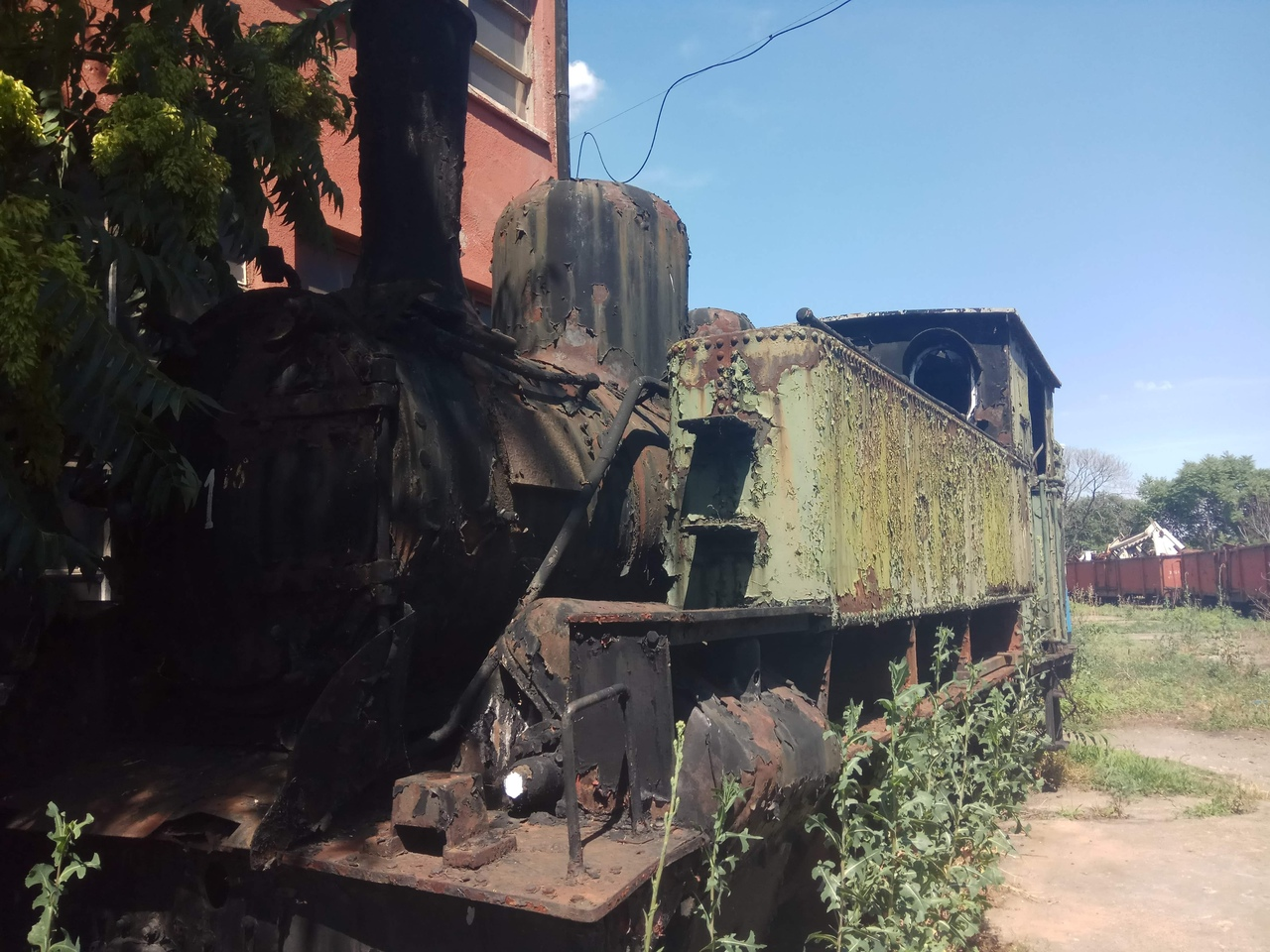 Парен локомотив 1.76 в локомотивно депо Септември.